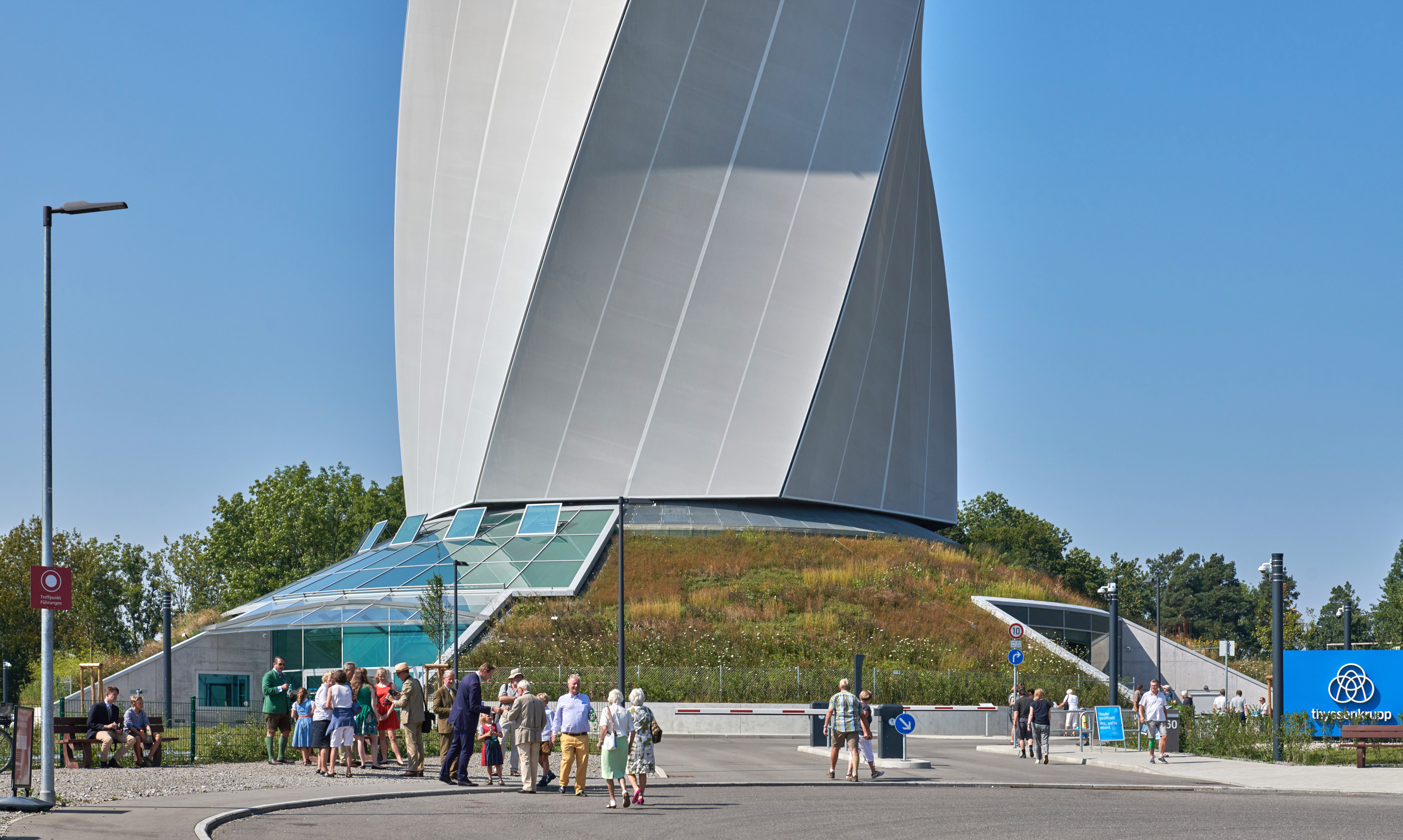 Thyssenkrupp Aufzugstestturm